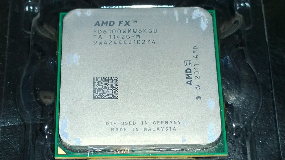 Package eines AMD FX 6100 Prozessors mit Wärmeleitpasteresten